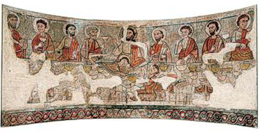 Pintura mural procedente de la catedral de la Seu d'Urgell en Cataluña. Spain. Título: Santa Cena. En la actualidad conservada en el Museo Episcopal de Vic.